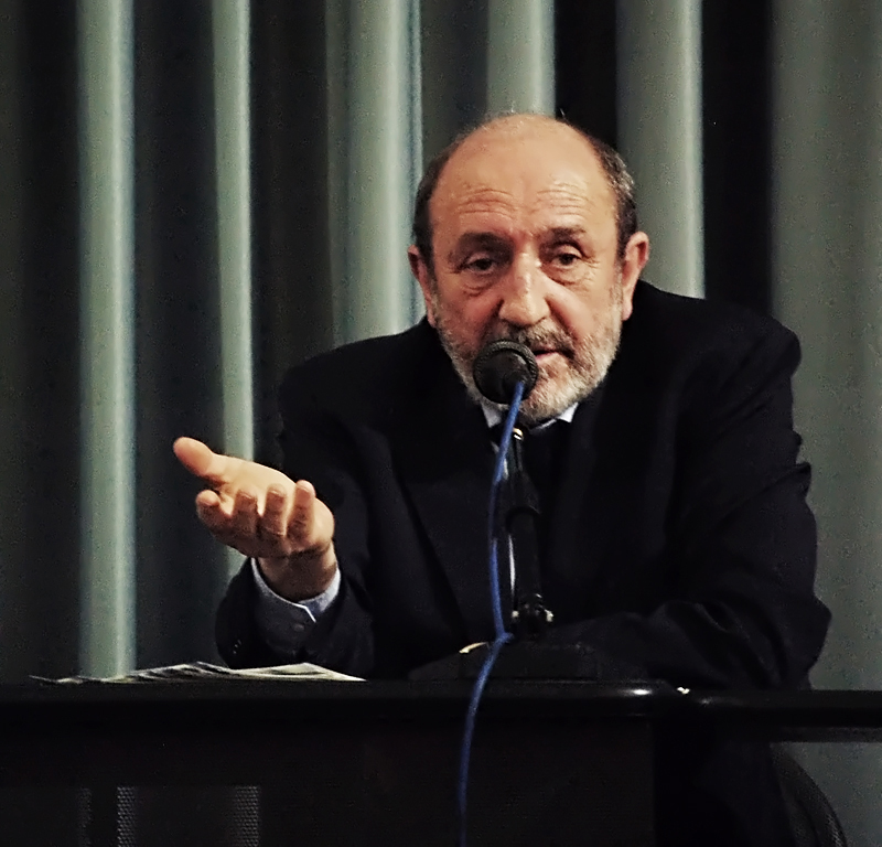 Il prof. Umberto Galimberti durante una conferenza